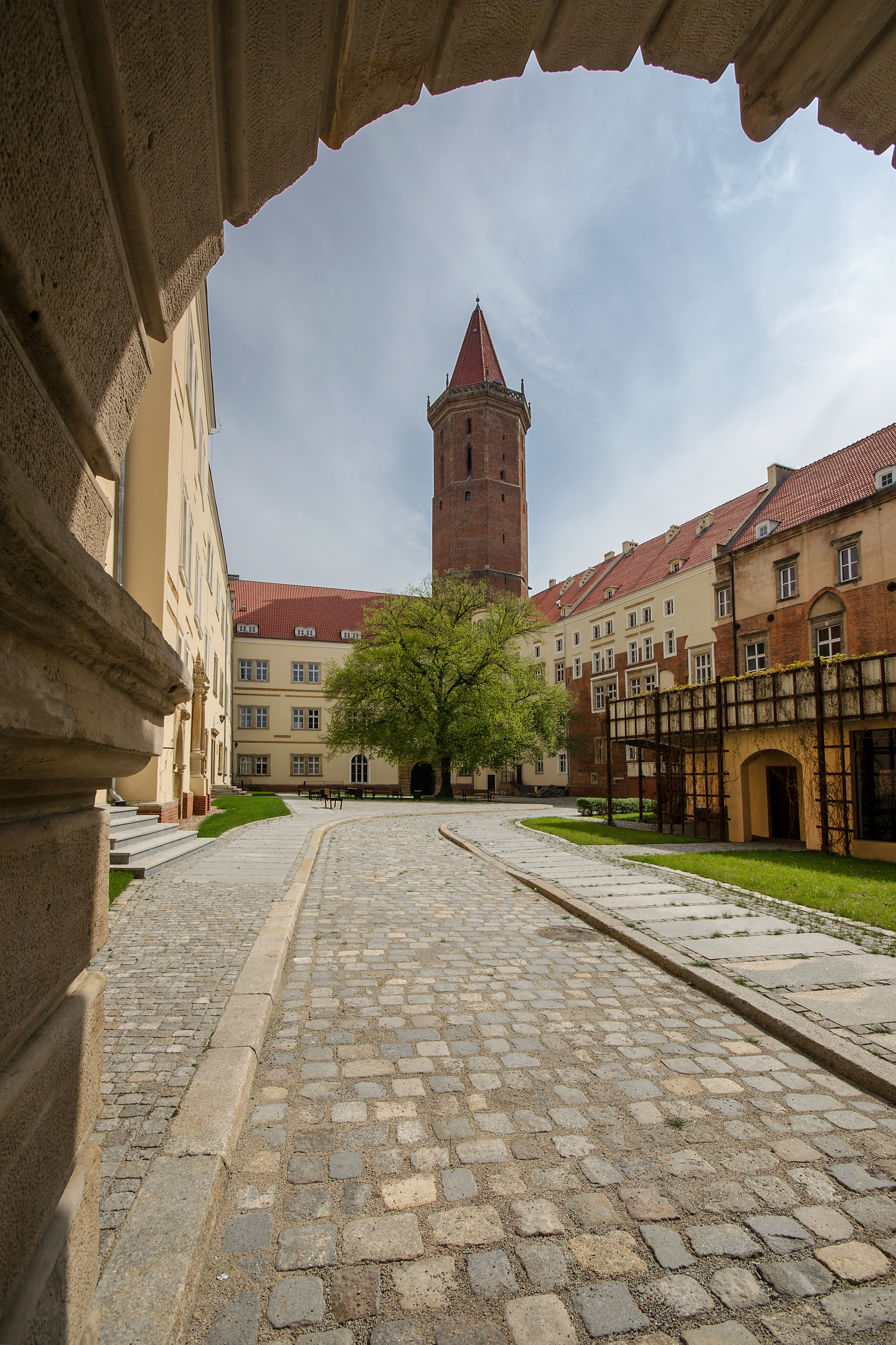 Legnica, zamek piastowski, XIII, XIX